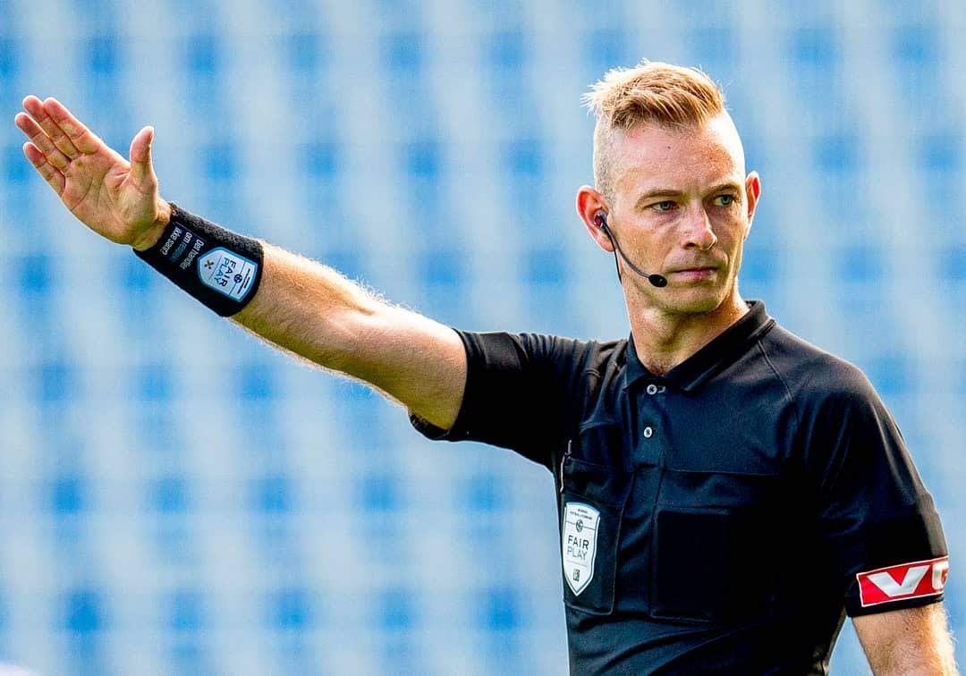 Daniel Higraff, kamp Skeid-Aalesund